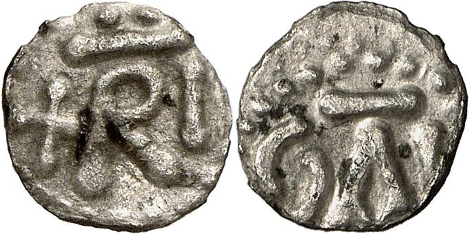 Denier. Avers : +RI sous un tilde. Revers : (K)AS rétrograde sous un tilde. Ce dernier a été attribué à Pépin le Bref pour l’abbaye de Chelles (Kala Monasteri ou variantes), mais c’est un denier mérovingien, comme le pensait déjà Prou. Son style est à rapprocher de celui des deniers trouvés dans la région de l’Aube avec un avers identique et les lettres AS précédées de deux points au revers. Chevalier et divers, BSFN, juin 1988, n°6 p. 387 et 388. Un denier similaire a été découvert avant 1980 à Saint-Denis, dans les fouilles urbaines dirigées par O. Meyer. Belfort, n°6636 en décrit un autre de la collection Joly d’après un dessin de Barthélemy. Un autre exemplaire est passé dans la vente Numismatica Genevensis 2, le 18 novembre 2002, n°373 (1, 03 g.). Cette pièce peut être rapprochée d’un autre denier dont l’attribution à Metz ne fait aucun doute et sur laquelle on lit AS, publié par M. Dhénin, BSFN, mars 1980 p. 663-666 (on ne voit pas s’il y a une lettre à gauche du A). L’avers serait donc une mention de lieu. Il est assez peu vraisemblable que l’on puisse lire RI pour Rimus (on trouve Remus), mais plutôt TRI pour Tricas en utilisant le tilde comme barre horizontale du T. Une attribution à la période de Charles Martel voire de Pépin Maire est évidente (736-751).